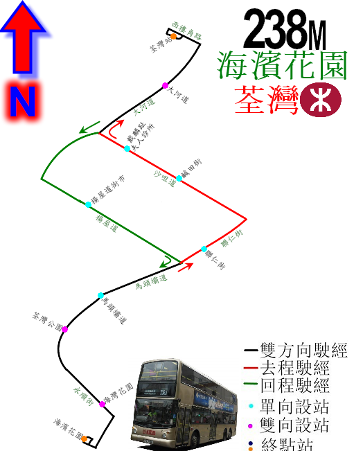 中文（香港）: 九巴238M線的走線圖